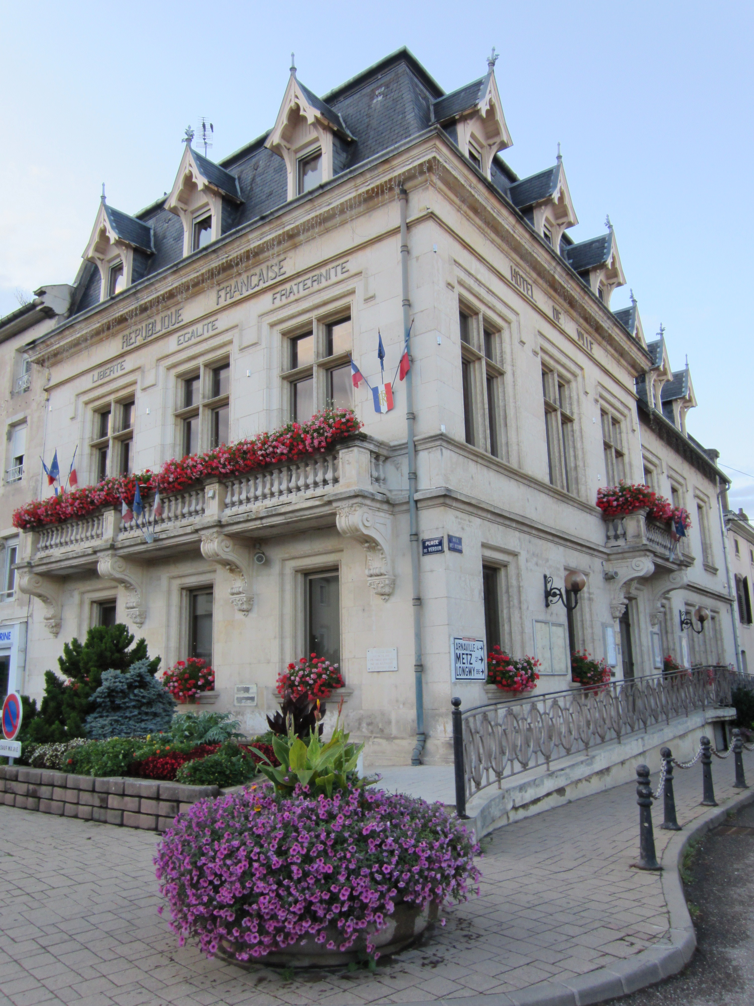 Description mairie Pagny Moselle mairie Pagny Moselle